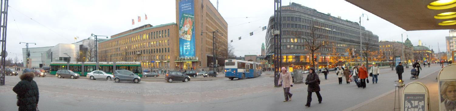 Mannerheimintie.